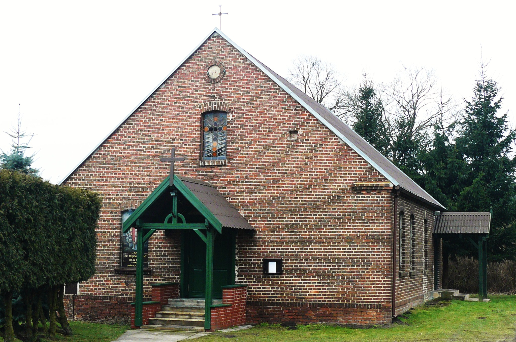 Kaplica św. Wojciecha w Stobnicy.